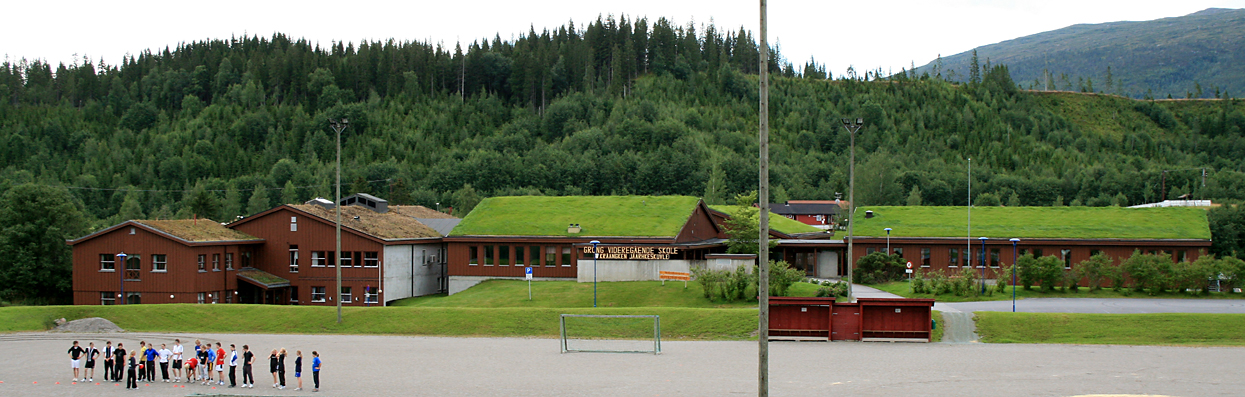 Grong videregående skole, Grong, Nord-Trøndelag.